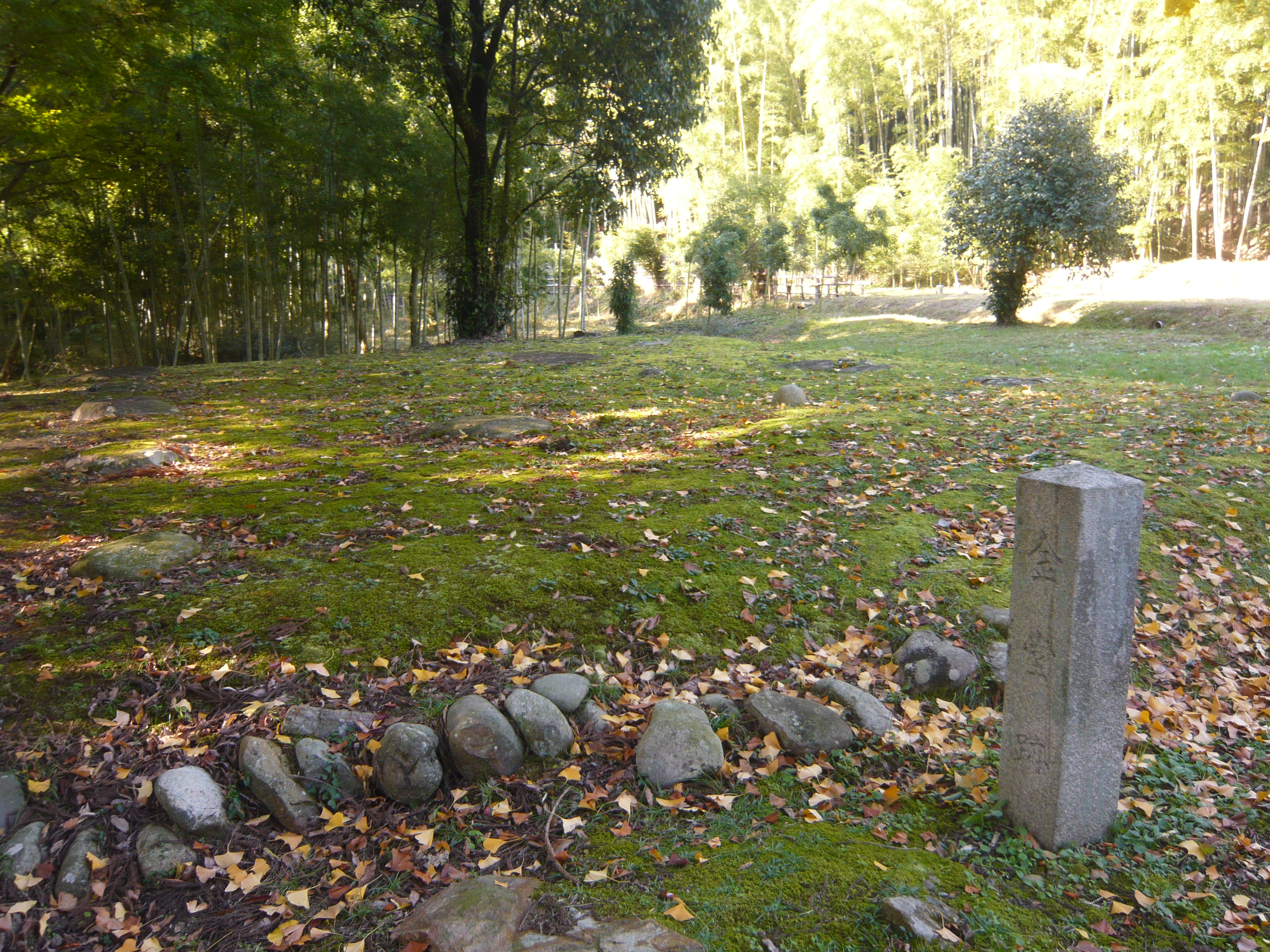 Ruins of Mirokuji Temple 弥勒寺跡 金堂跡（弥勒寺跡 (関市)）,Seki,Gifu,Japan（岐阜県関市）で撮影。